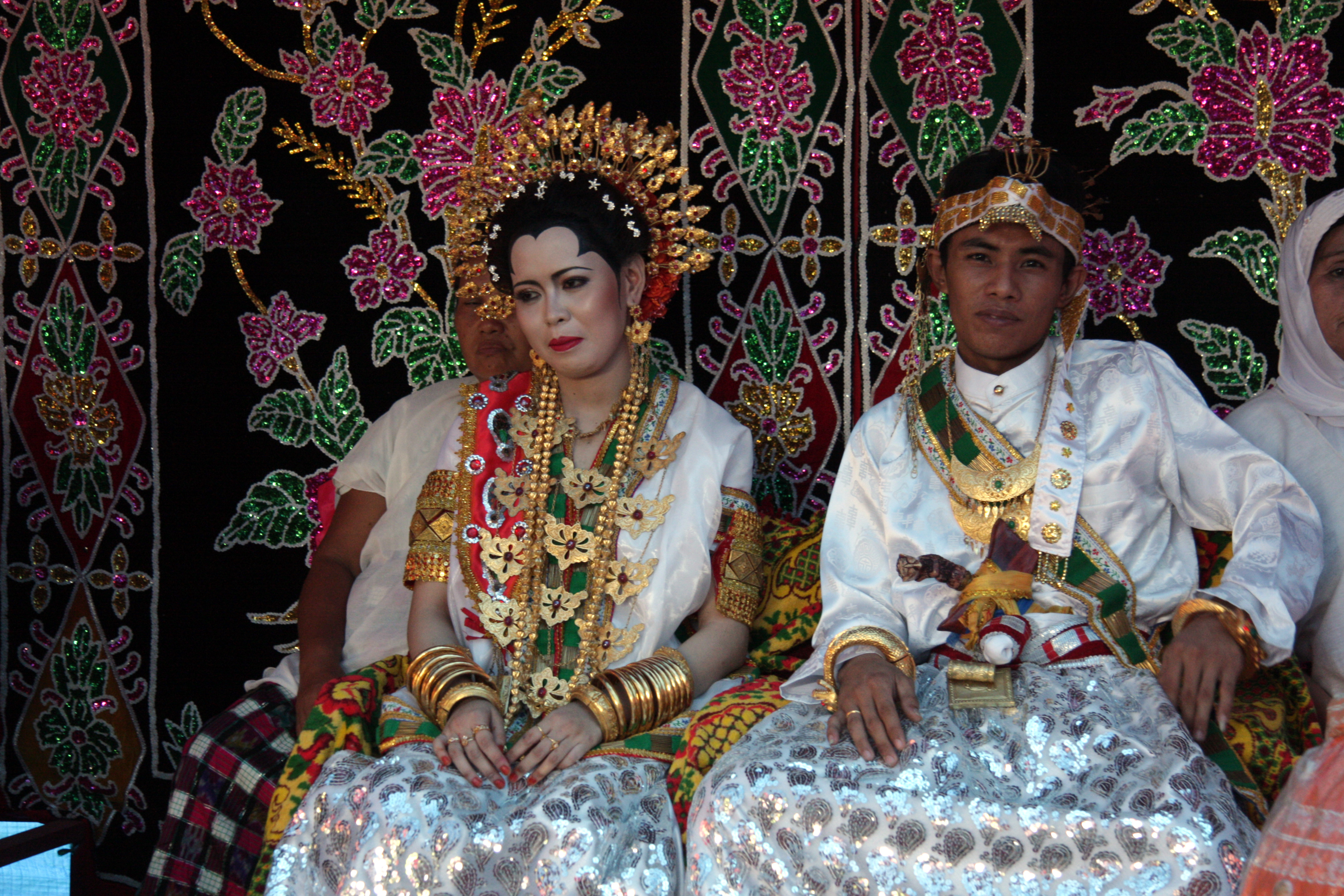 mariage traditionel aux célèbes